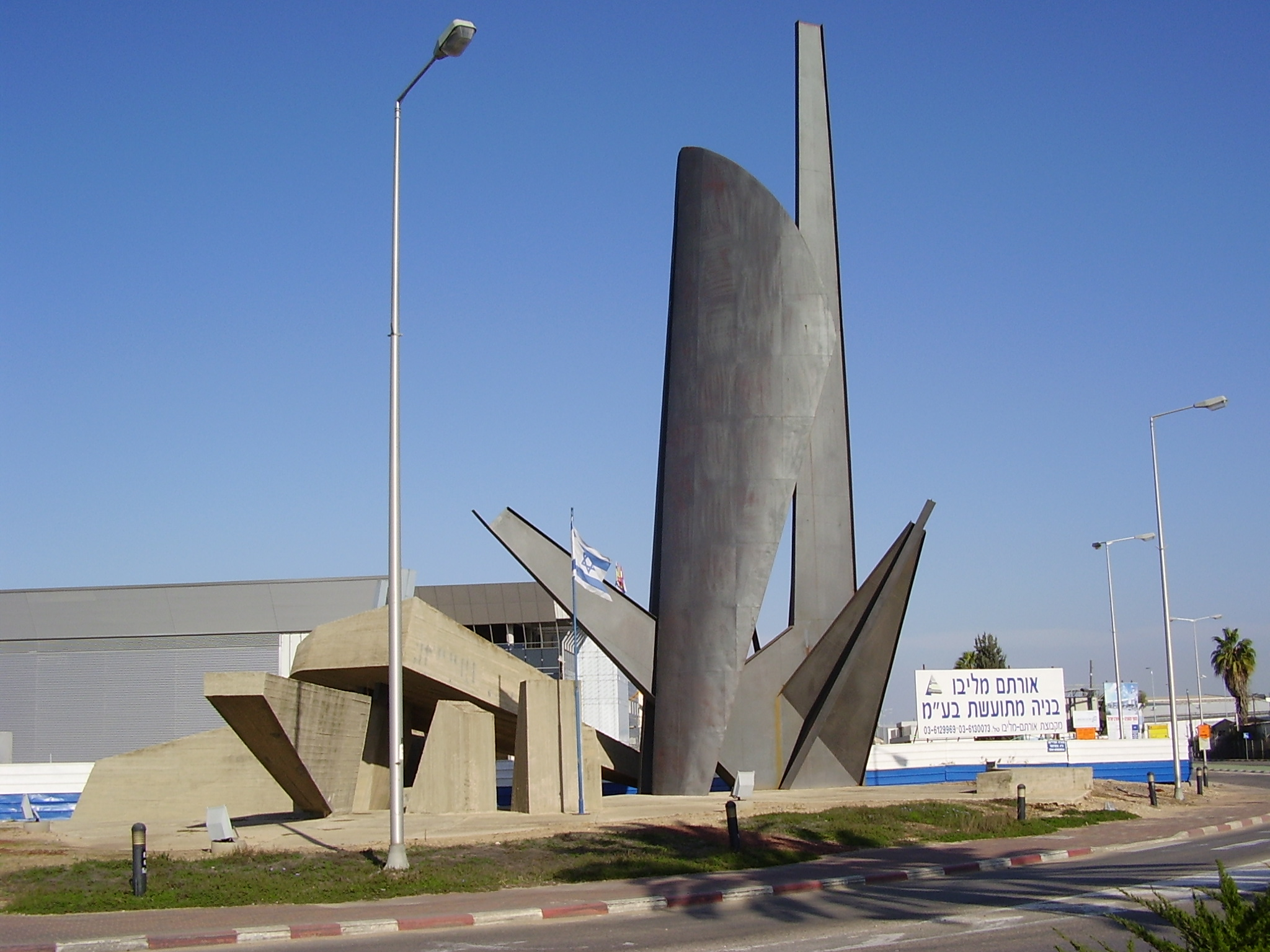 Sculpture